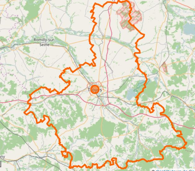 Arrondissement et ville de Troyes, limites administratives.